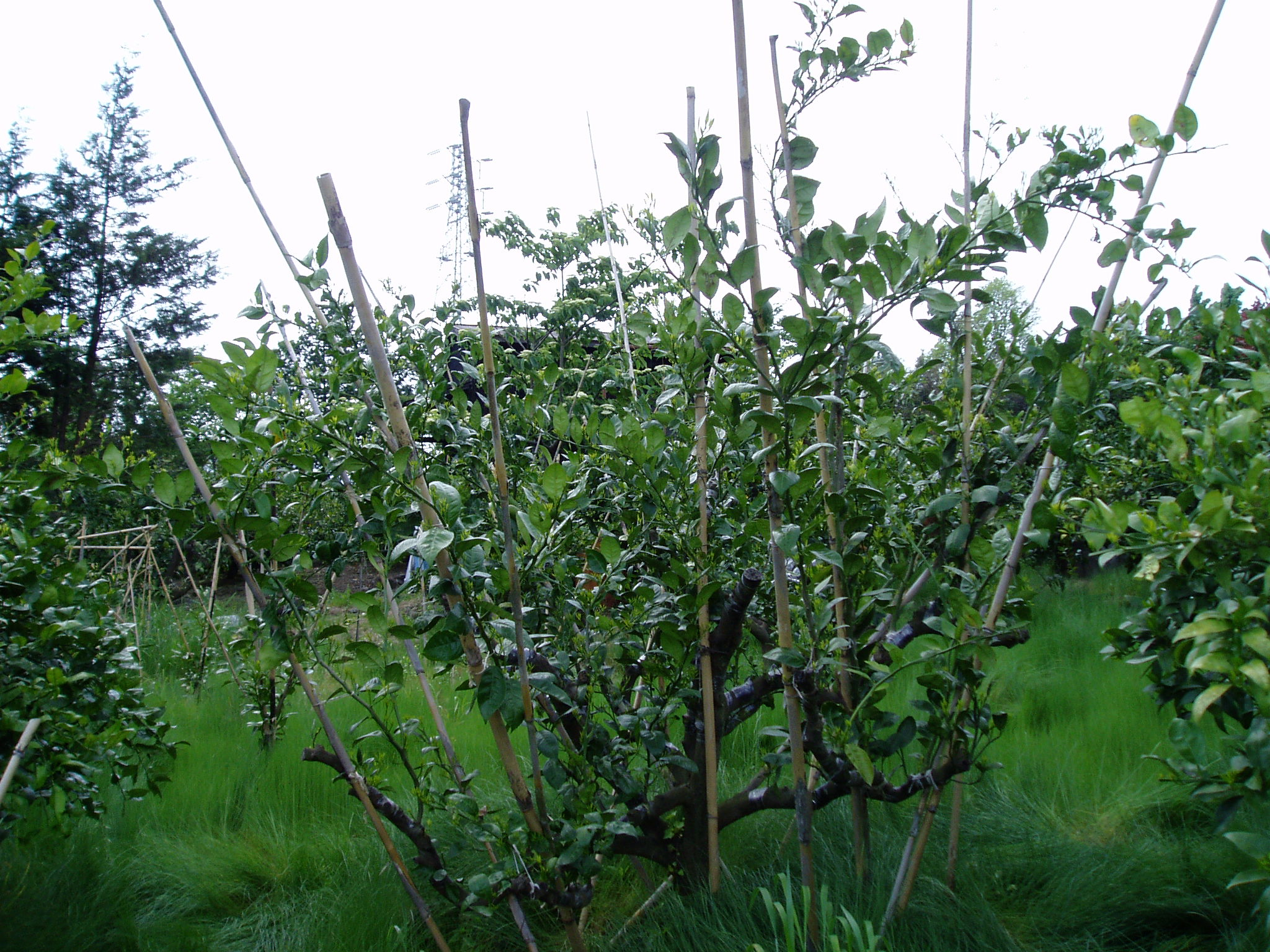 高接ぎ一年後 支柱による誘引